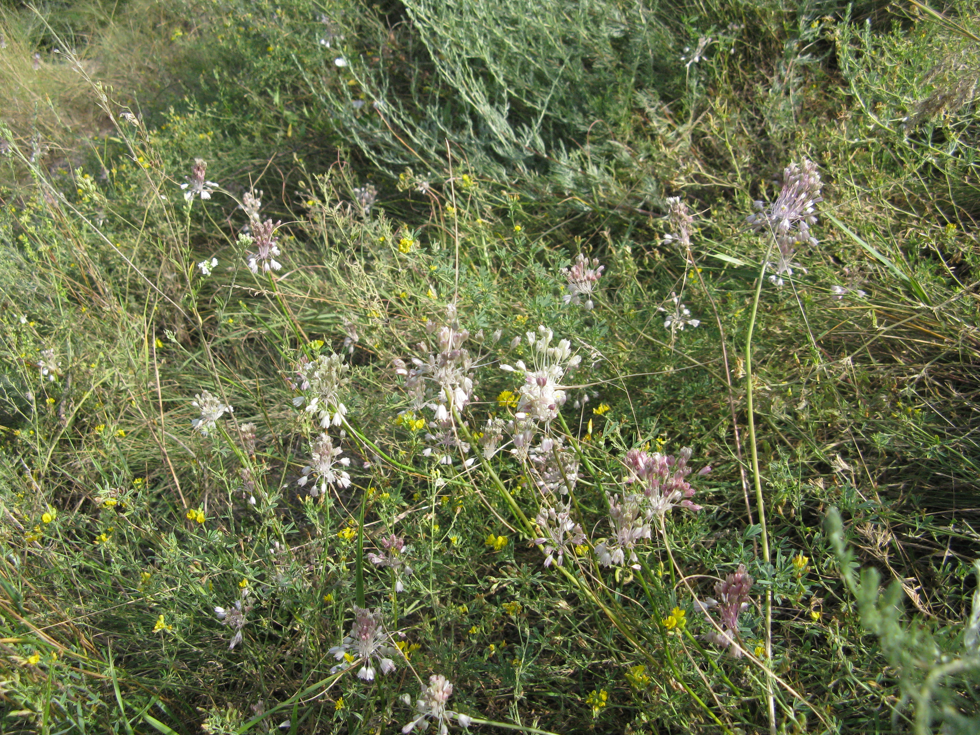 Виходи аркозових пісковиків, м. Кривий Ріг